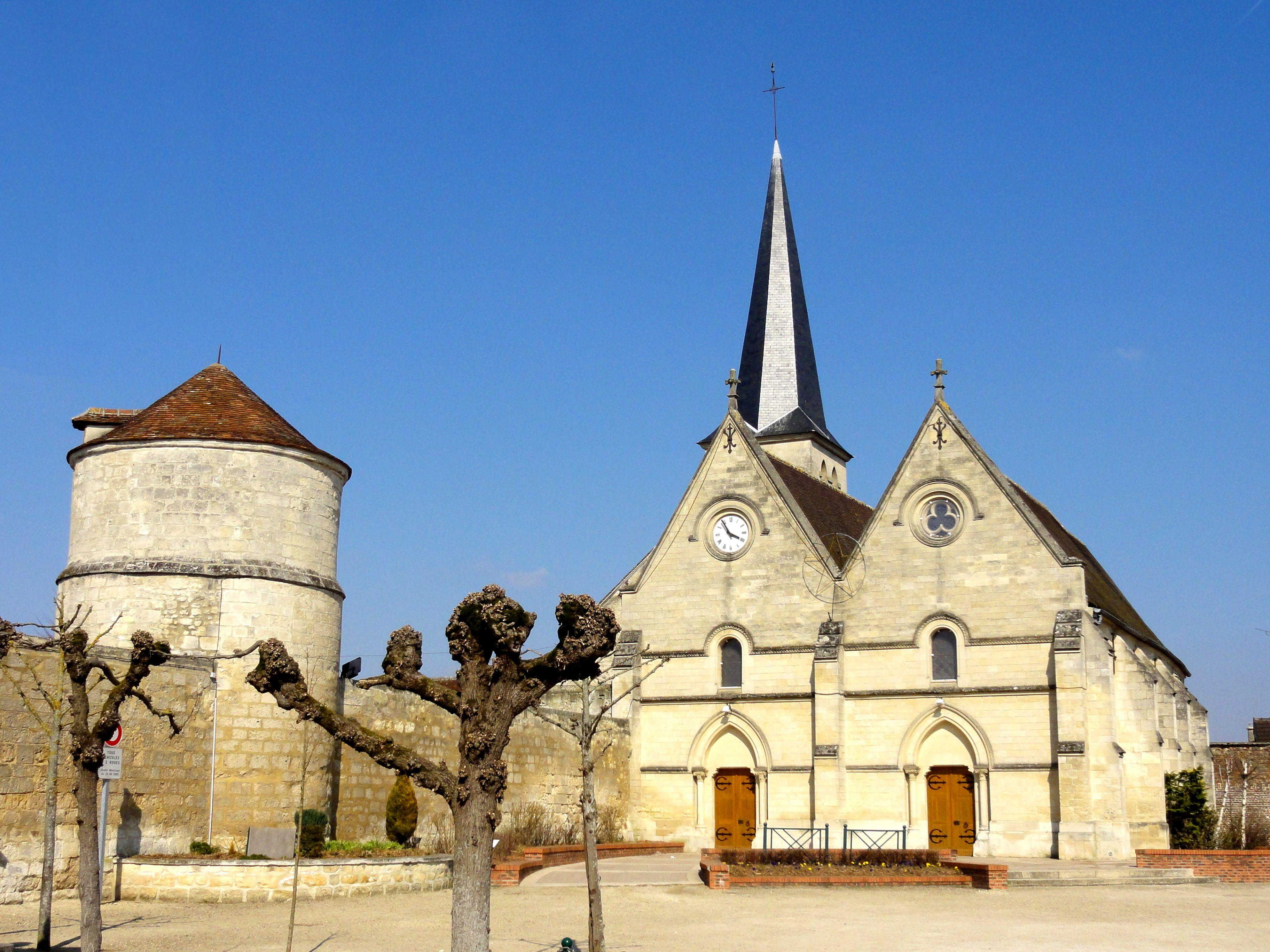 Colombier et église Saint-Ouen.